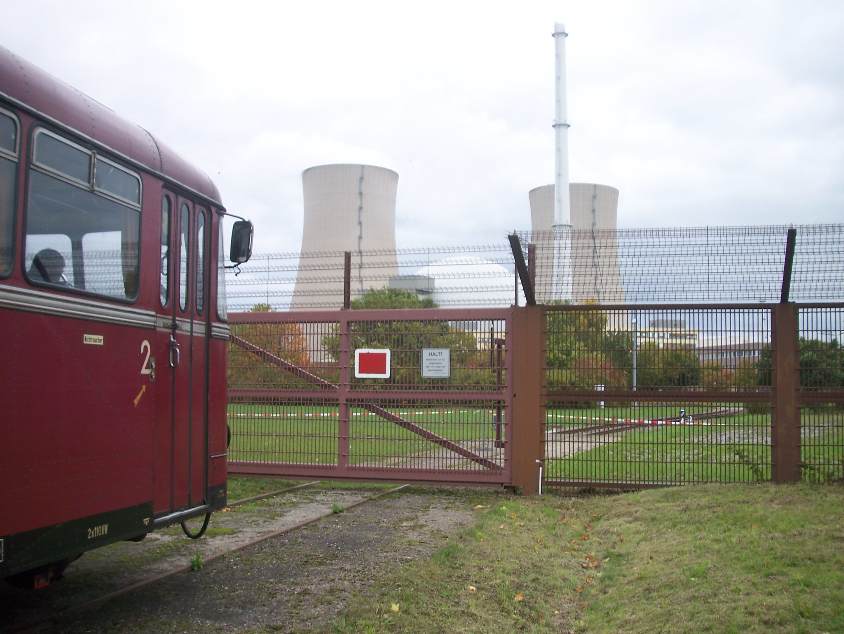 Schienenbus Sonderfahrte der DGEG, auf dem Anschlussgleis des AKW-Grohnde